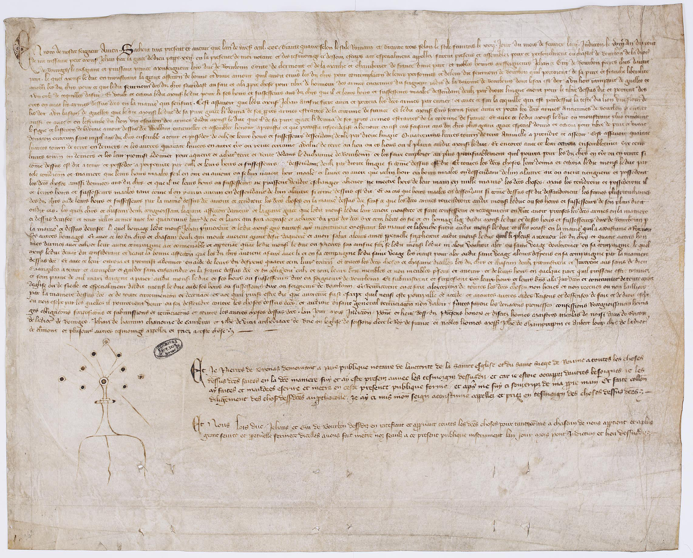 Anoblissement et octroi d’armoiries par le duc Louis Ier de Bourbon. Château de Bourbon-l’Archambault, 22 février 1334